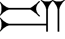 Cuneiform sign